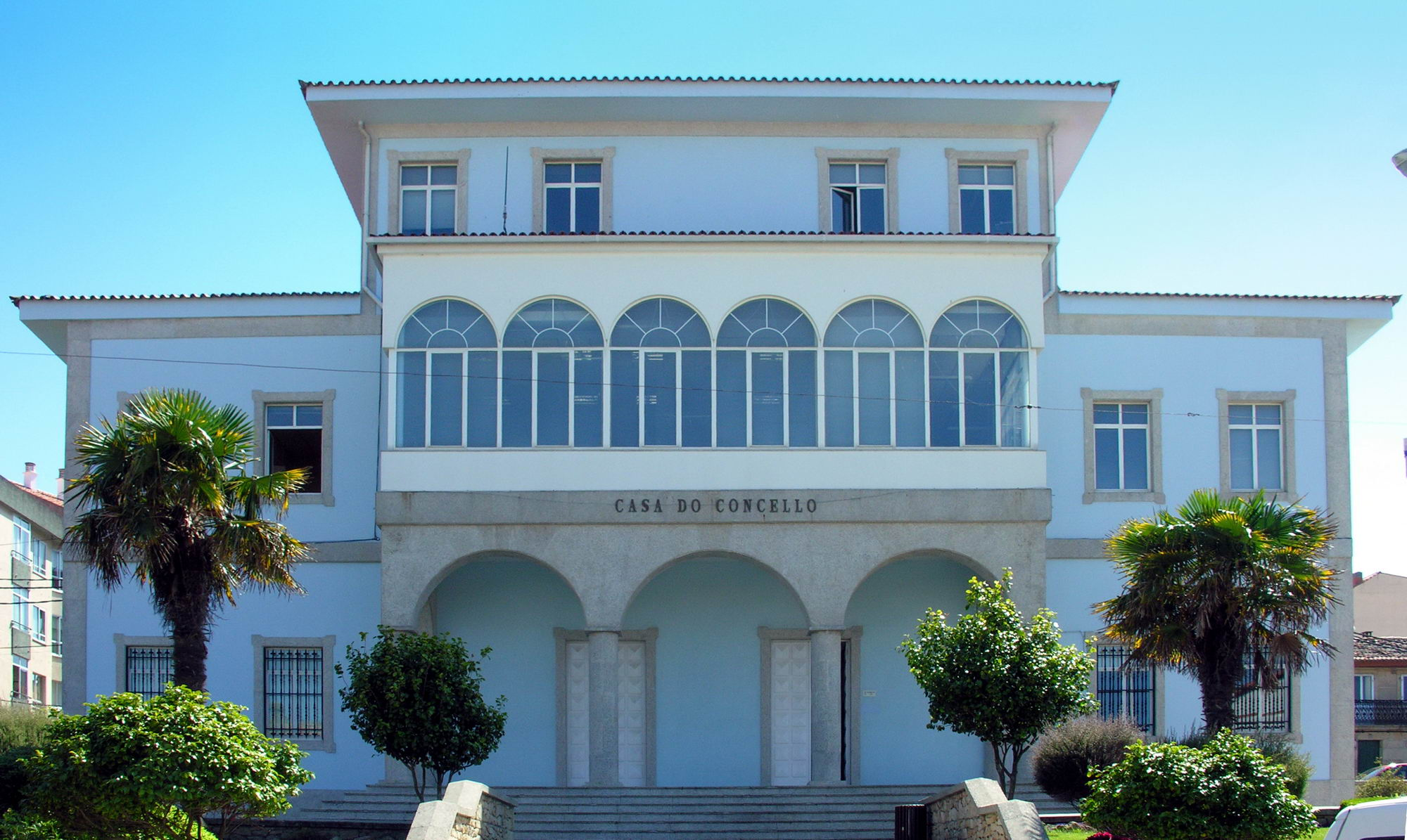 Casa do Concello, Porto do Son, Galicia